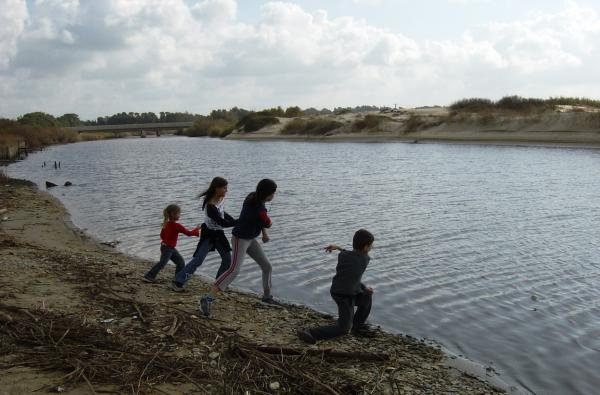 ילדים על גדת נחל אלכסנדר בגן לאומי בית ינאי. משליכים חלוקי נחל למים